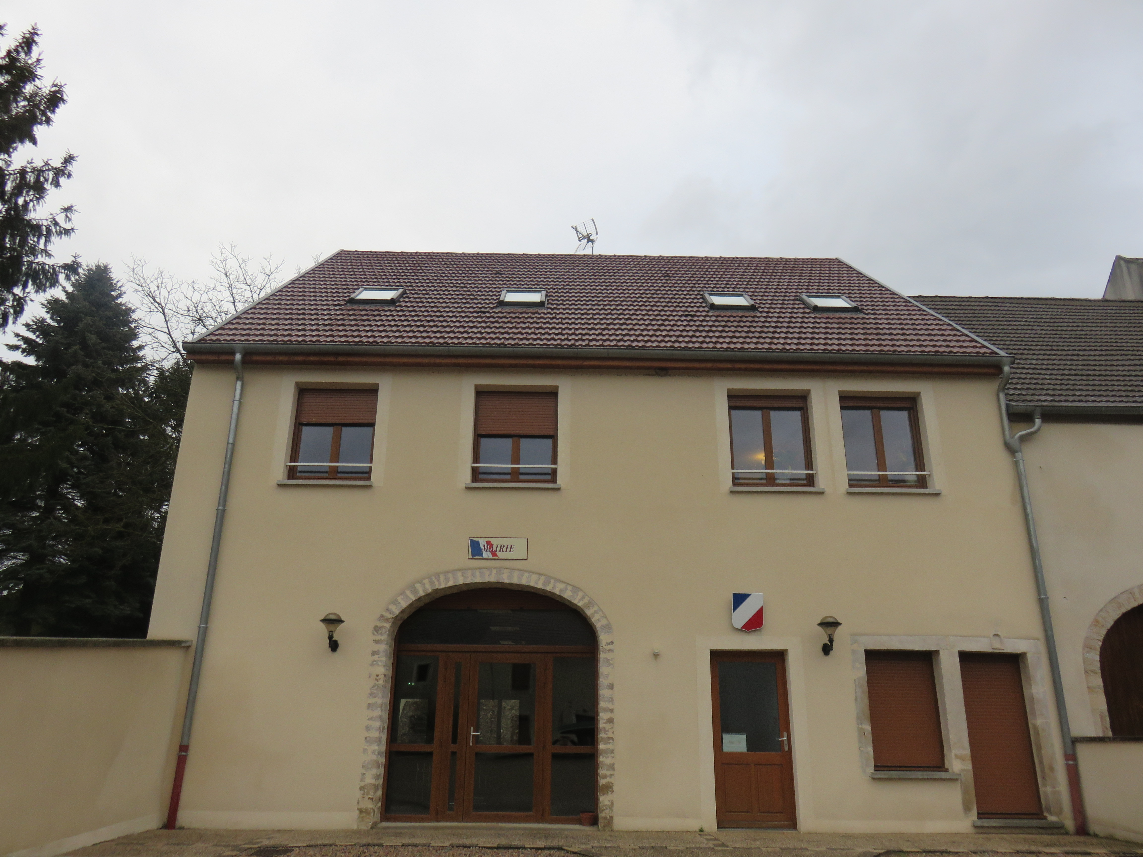 Pointre (Jura, France) en janvier 2018.